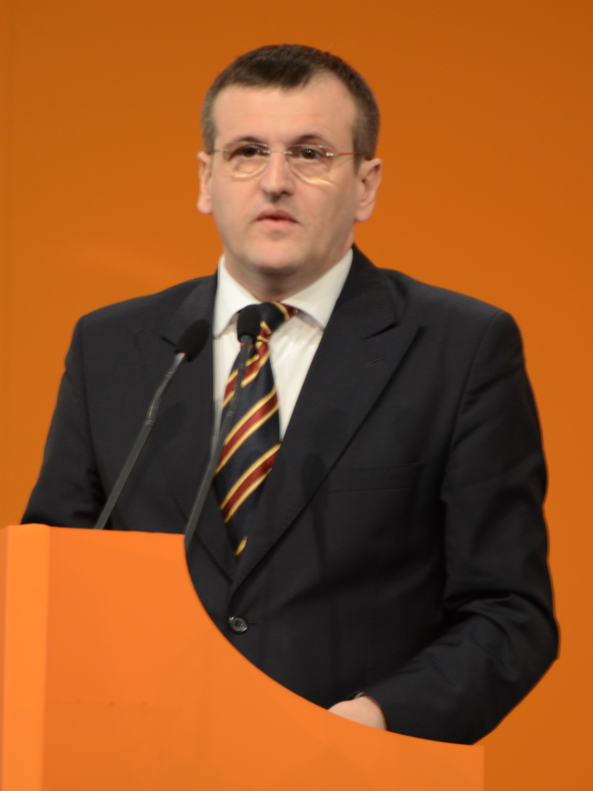 Cristian Preda (la Convenția națională extraordinară a Partidului Democrat-Liberal, 23 martie 2013)